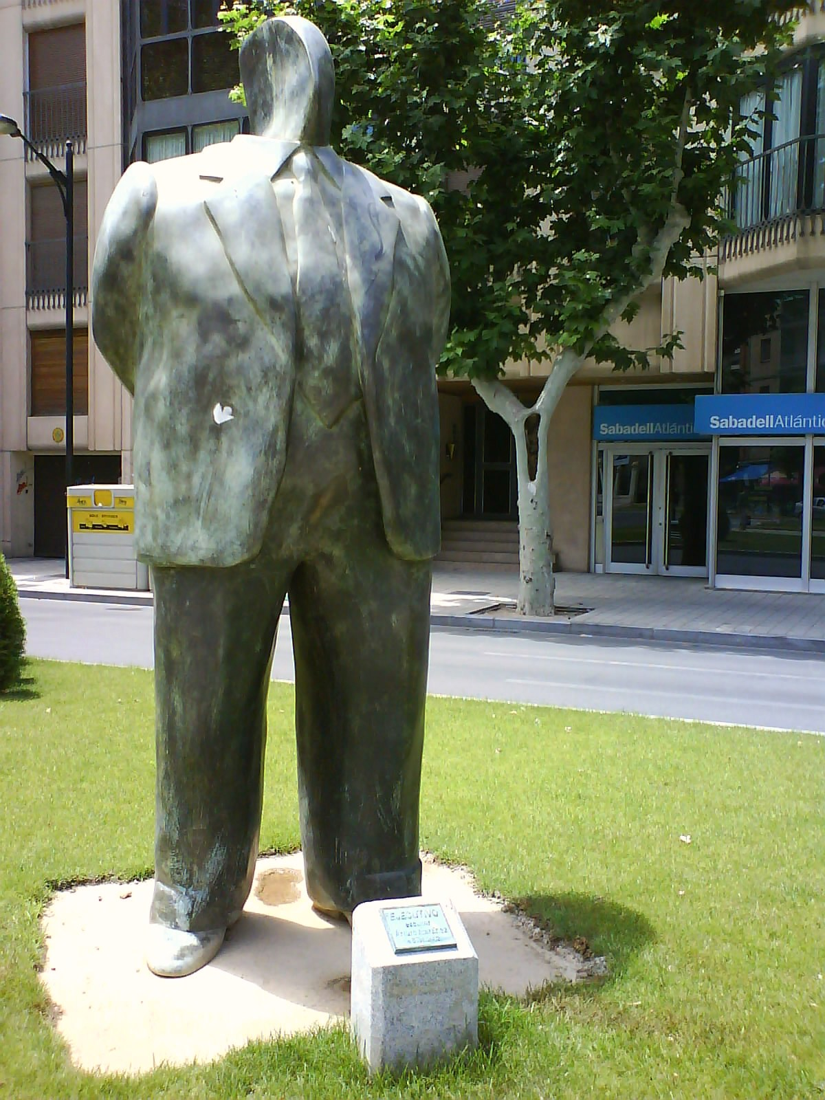 Escultura llamada "Ejecutivo" de Arturo Martínez, situada en la plaza de Gabriel Lodares de Albacete